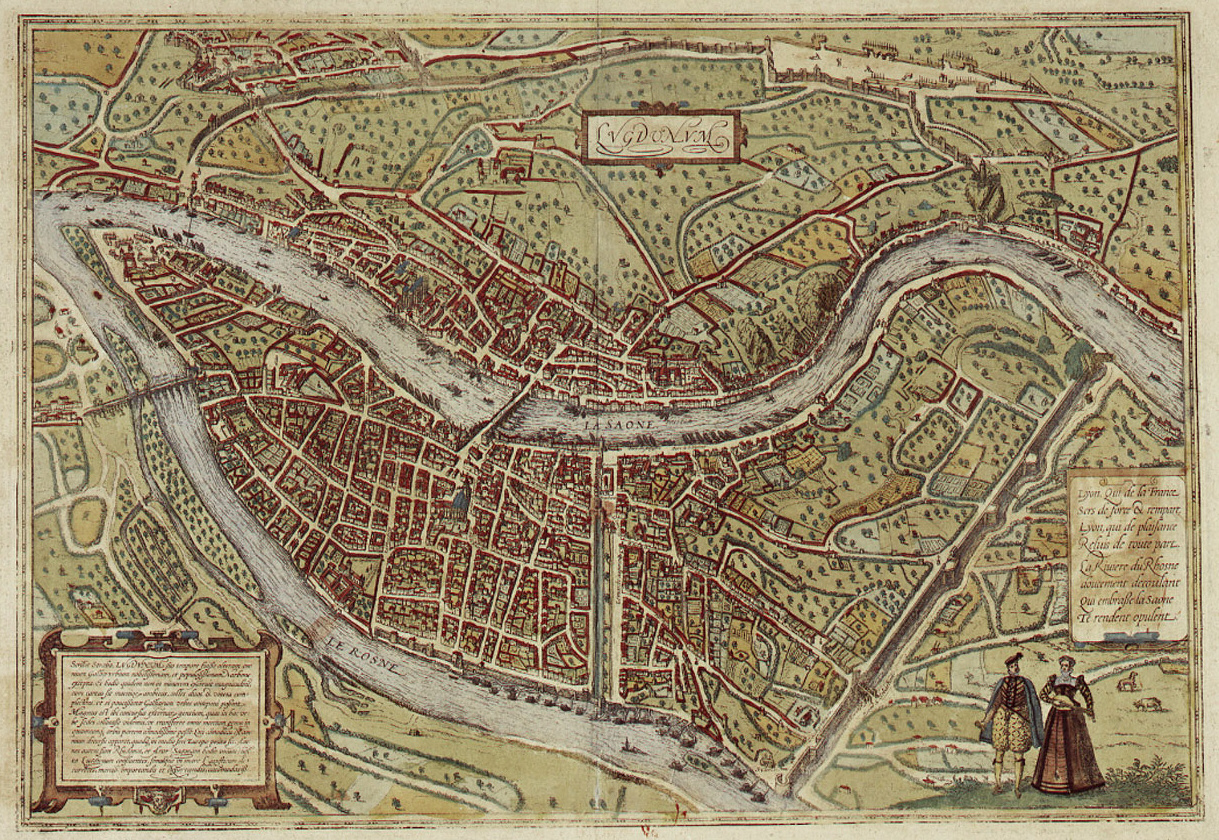 Lyon